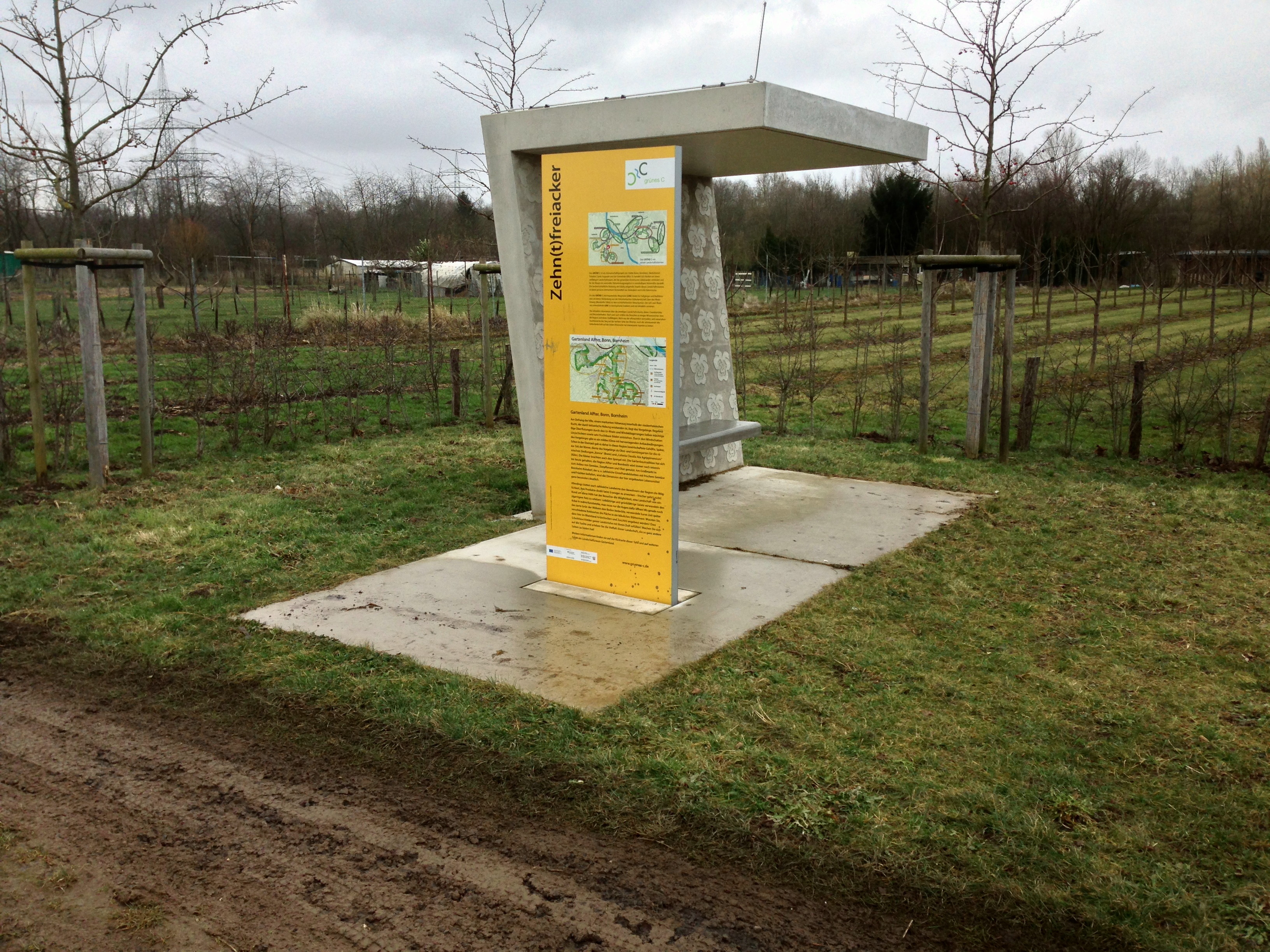 Unterstand und Infotafel "Zehn(t)acker in Alfter